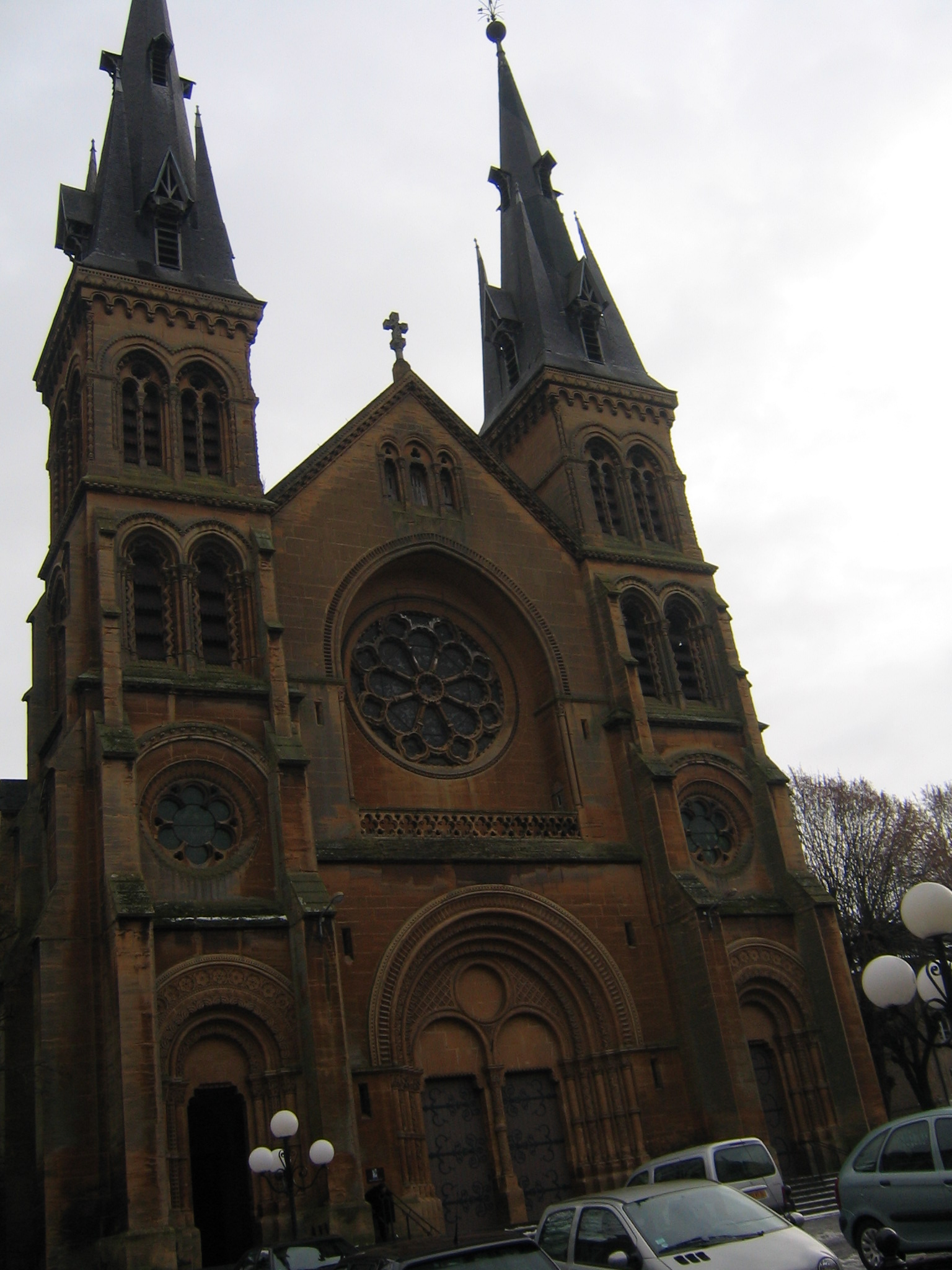 Eglise Saint Remi Charleville-Mézières